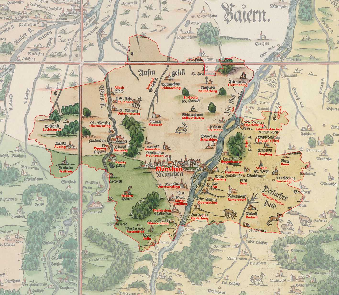 Gegenüberstellung der Bairischen Landtafeln Philipp Apians mit dem heutigen Umriss der Stadt München